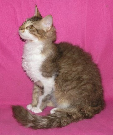 LaPerm cat